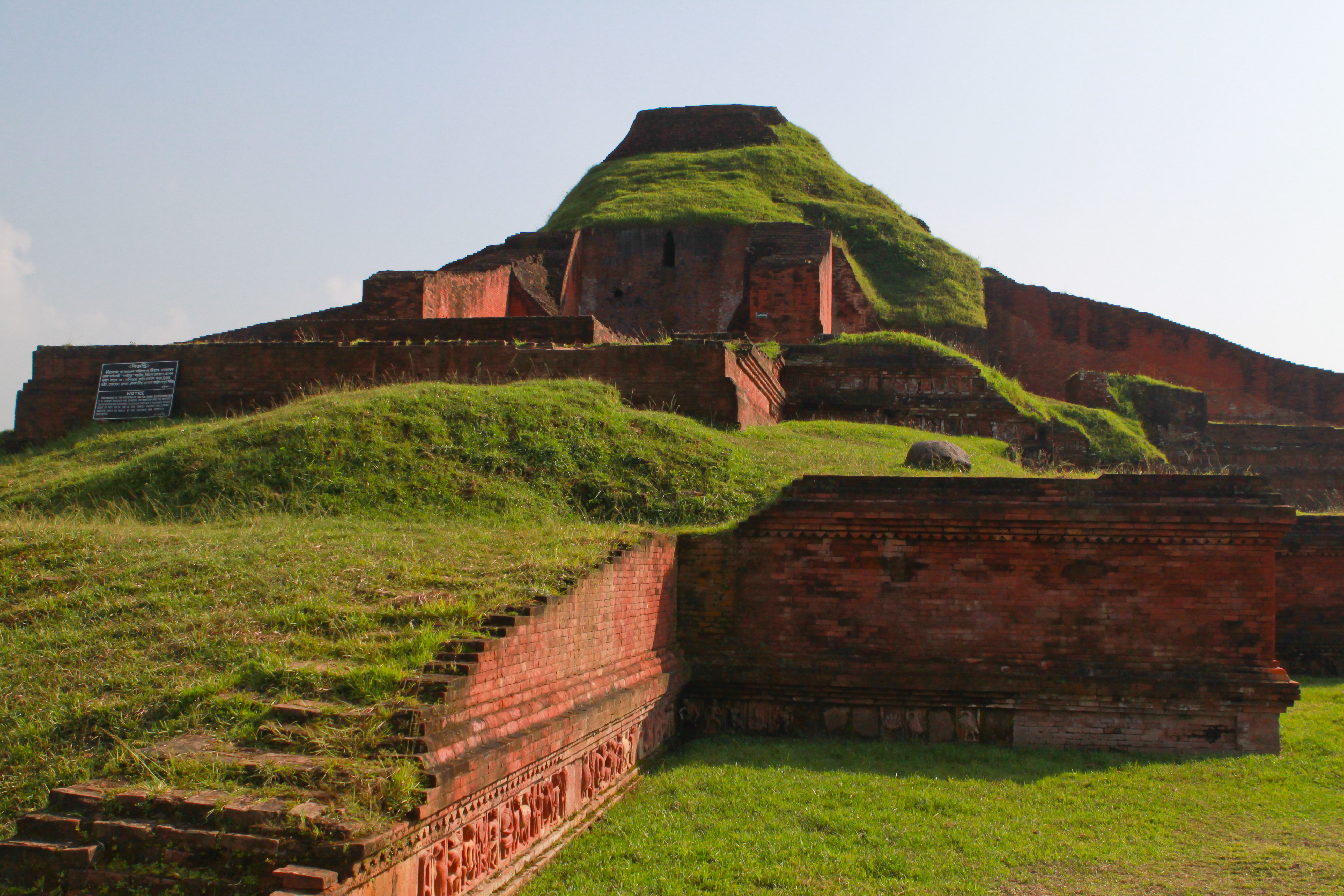 পাহাড়পুর বৌদ্ধ বিহার